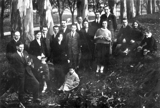 Membros da Escola Dramática Galega, iniciativa das Irmandades da Fala da Coruña, no parque de Santa Margarida da Coruña no ano 1923